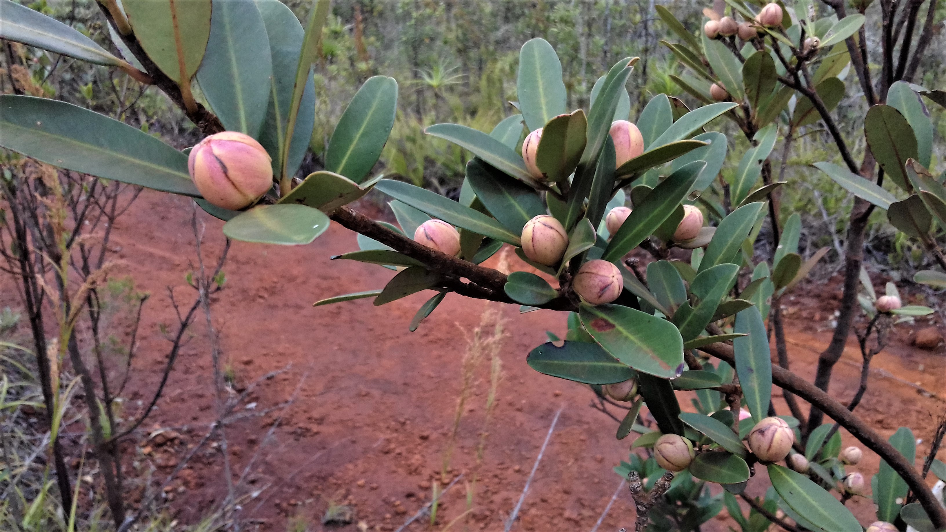 Rameau de Montrouziera sphaeroidea photographié dans le parc provincial de la Rivière Bleue, à Yaté, Province Sud, Nouvelle-Calédonie.